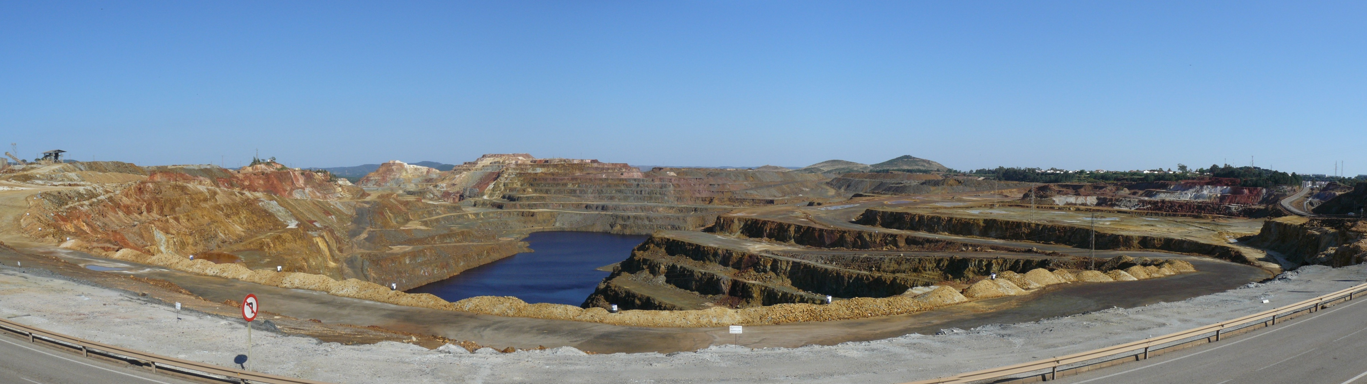 Minas en Minas de Riotinto